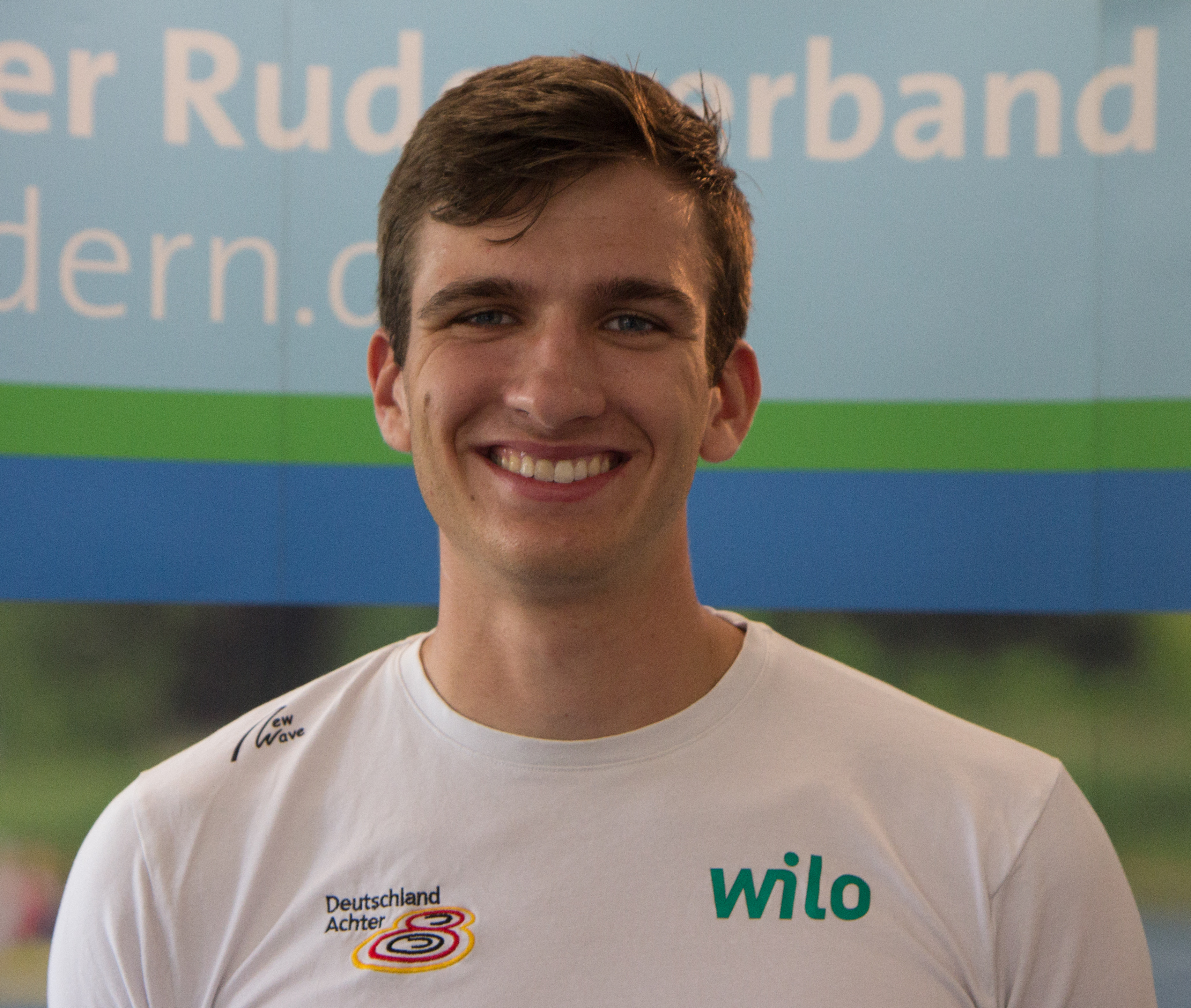 Medientag des Ruderverbandes in der Ruderakademie Ratzeburg am 6. September 2017: Christopher Reinhardt